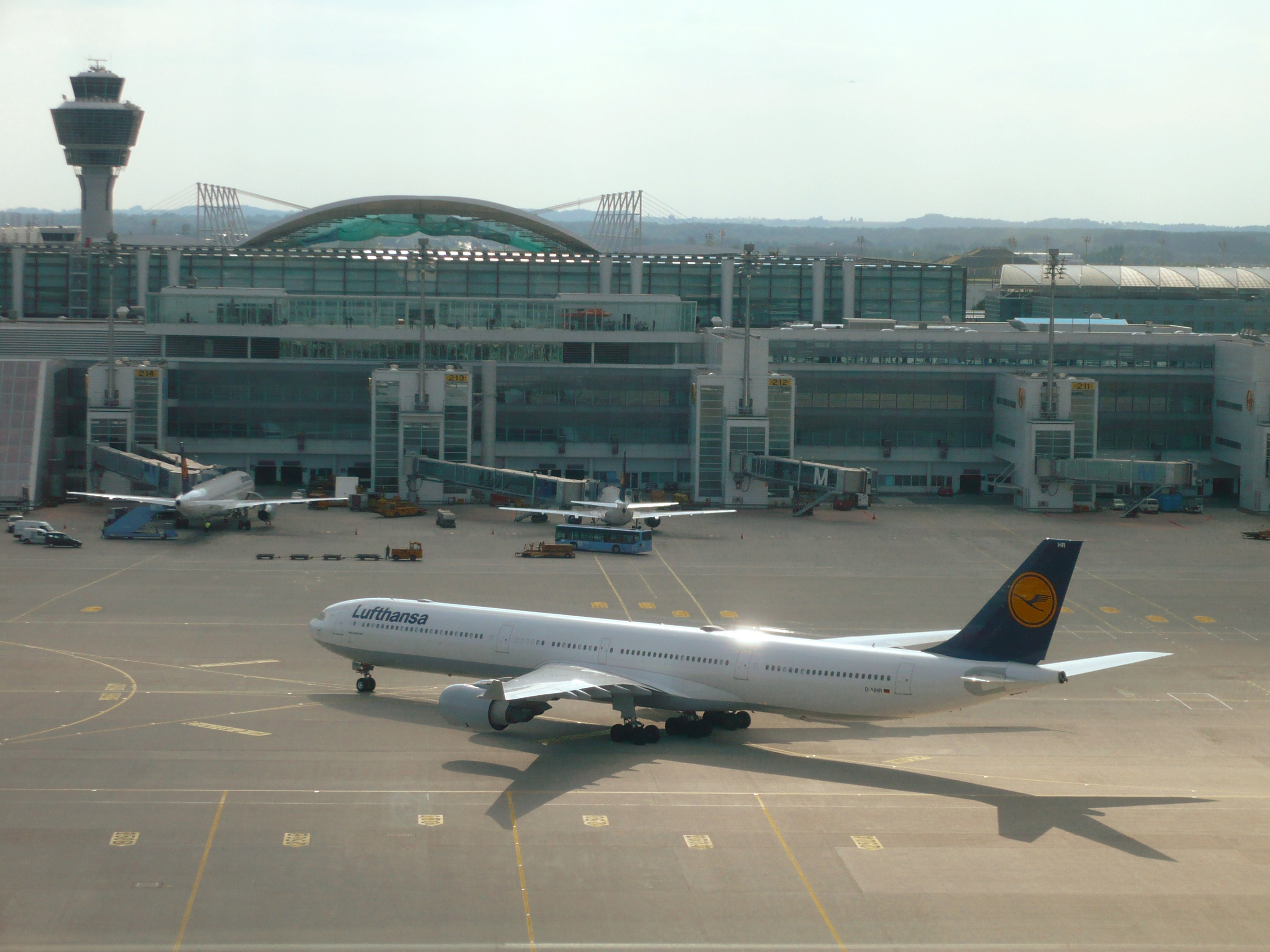 Airbus A340-600 der Lufthansa auf dem Vorfeld 2 des Flughafen München Franz Josef Strauß